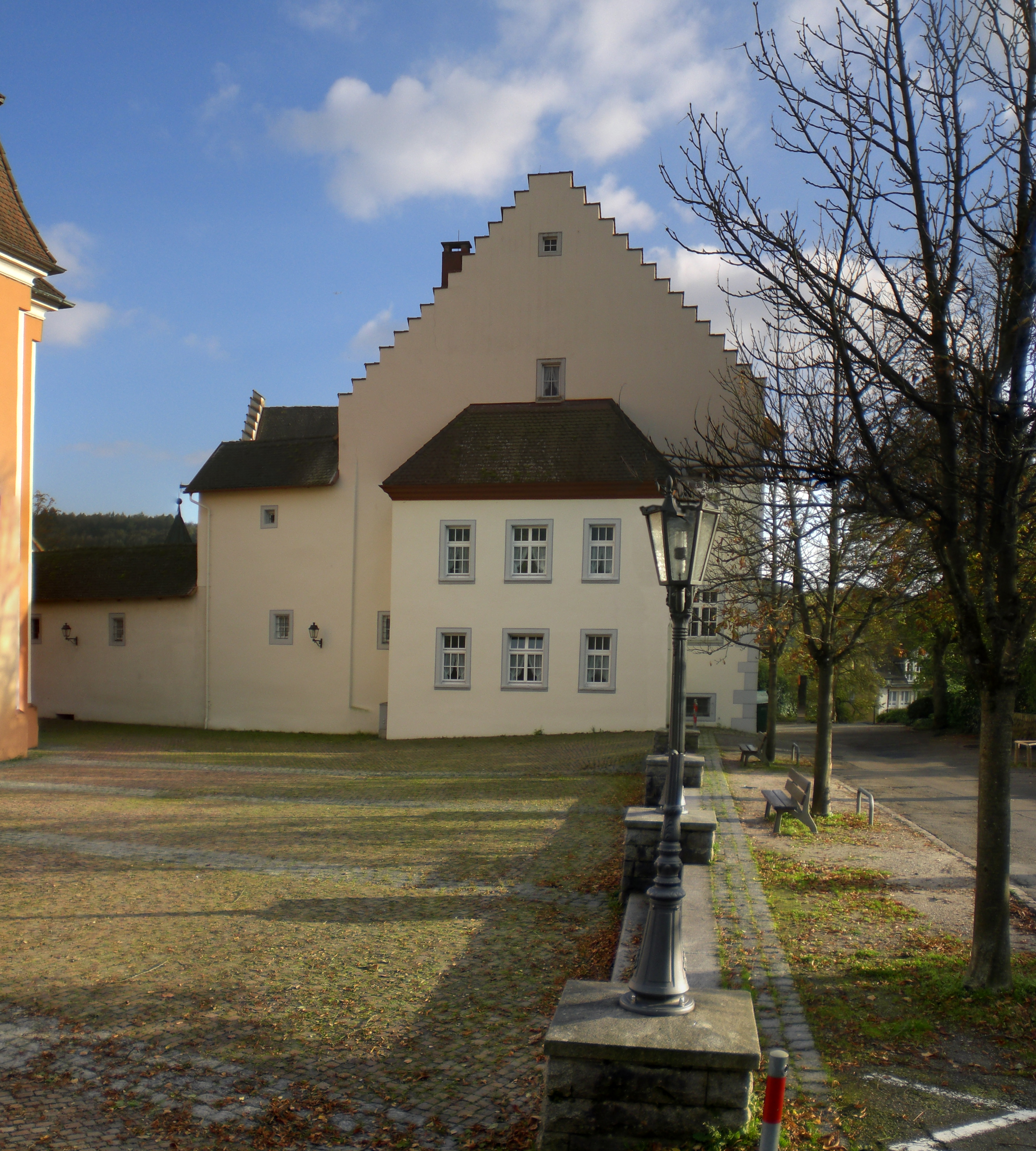 Schloss Tiengen, links daneben Katholische Pfarrkirche St. Maria Himmelfahrt, Waldshut-Tiengen.